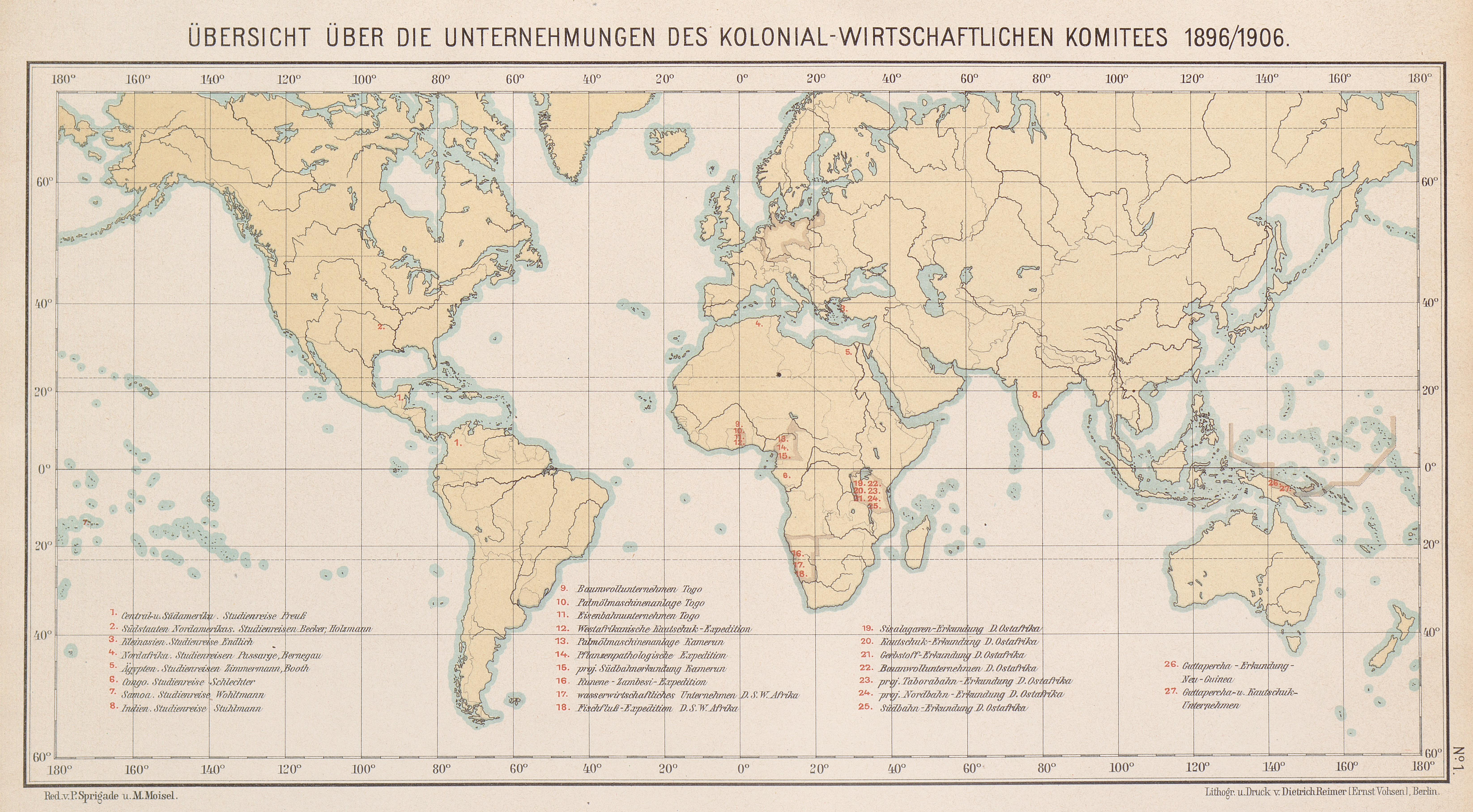 Wirtschaftsatlas der Deutschen Kolonien